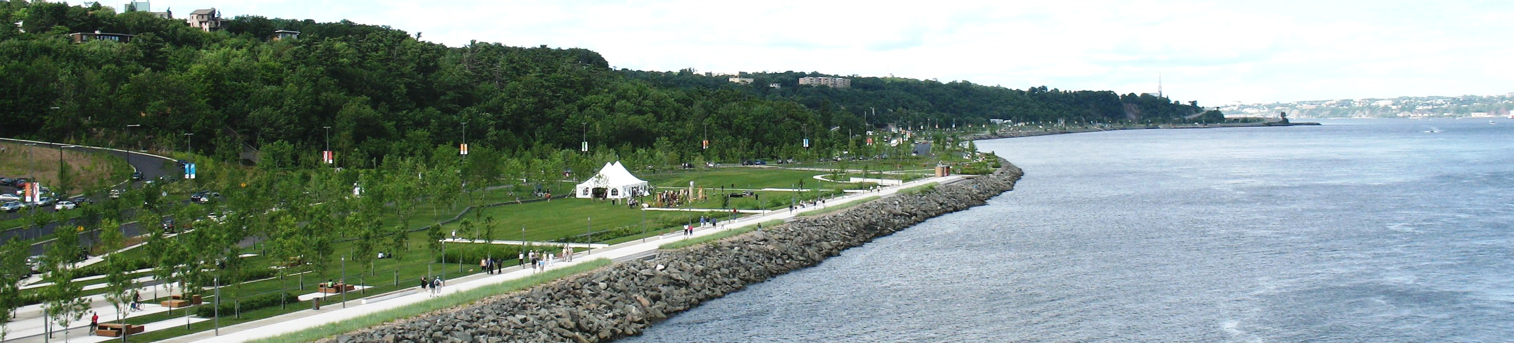 Promenade Samuel-De Champlain, Ville de Québec, province de Québec, Canada